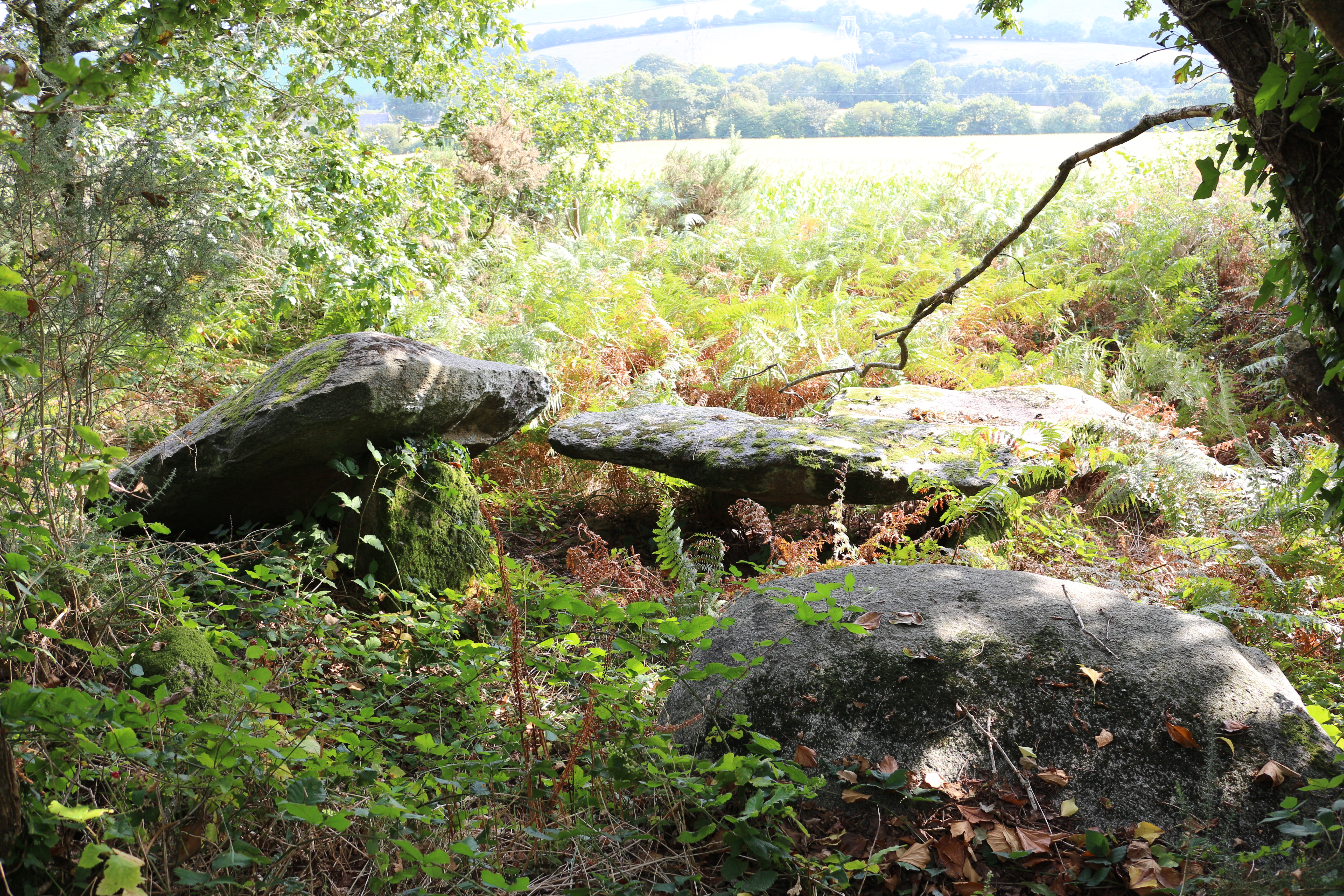 Dolmen et vestiges du cairn de Keringard, dit « Bara hir », commune d'Elliant, Finistère, Bretagne, France.